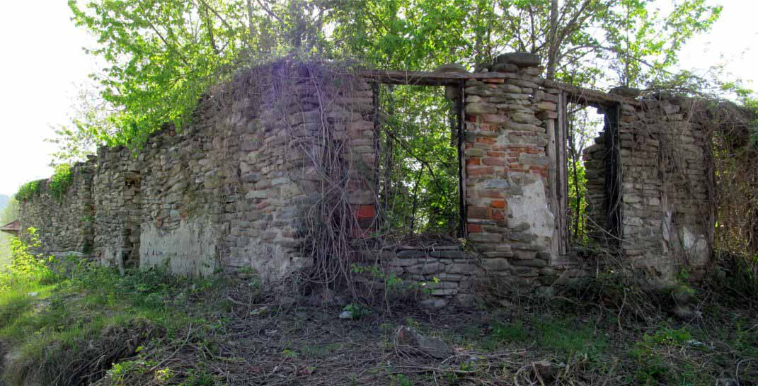 Ruinele conacului Nae Gaftoi